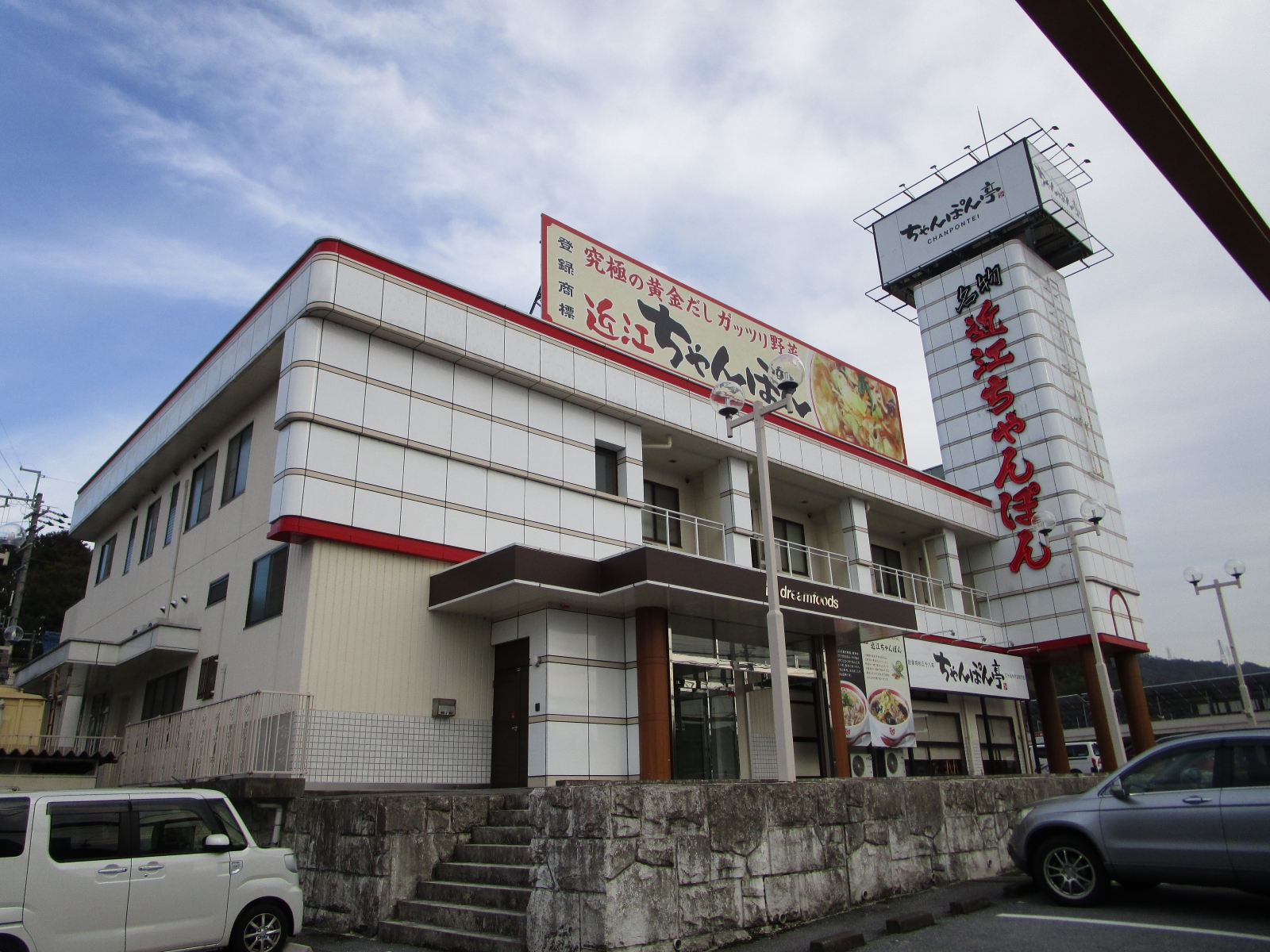 ドリームフーズ本社（ちゃんぽん亭総本家本店）